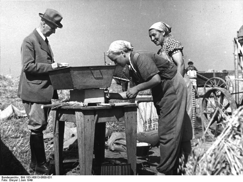 Malchow, Prof. Lembke prüft Saatgut Zentralbild/Dreyer Juni 1949 Das VE-Saatzuchtgut Malchow auf der Insel Poel, Kreis Wismar, Bezirk Rostock. U.B.z.: Professor Dr. Hans Lembke, der Leiter des Betriebs, prüft das geerntete Saatgut. Abgebildete Personen: Lembke, Hans Prof. Dr.: Direktor des Instituts für landwirtschaftliche Pflanzenzüchtung Rostock, DDR (GND 119512556)